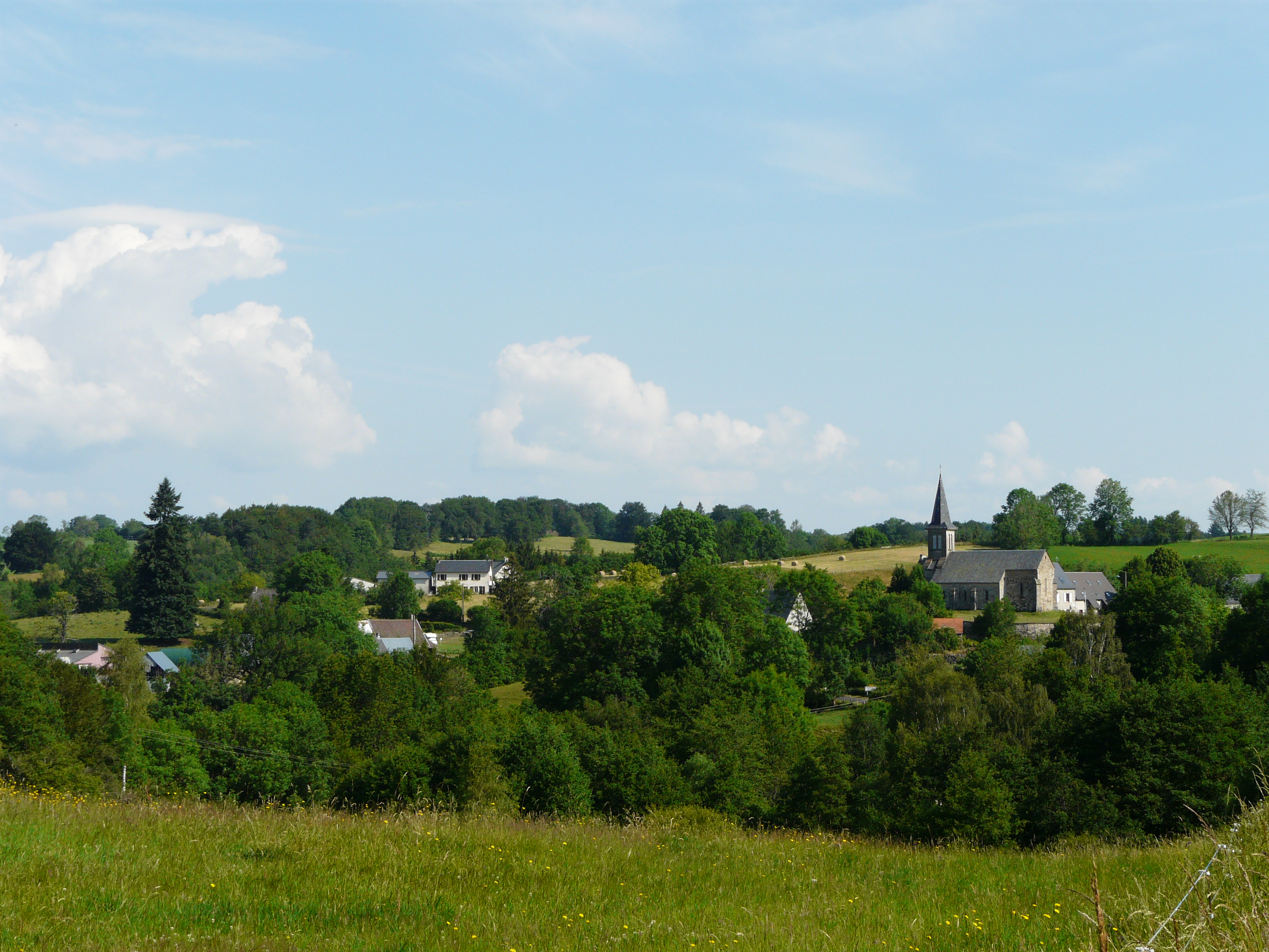 Le village de Trémouille-Saint-Loup, Puy-de-Dôme, France.